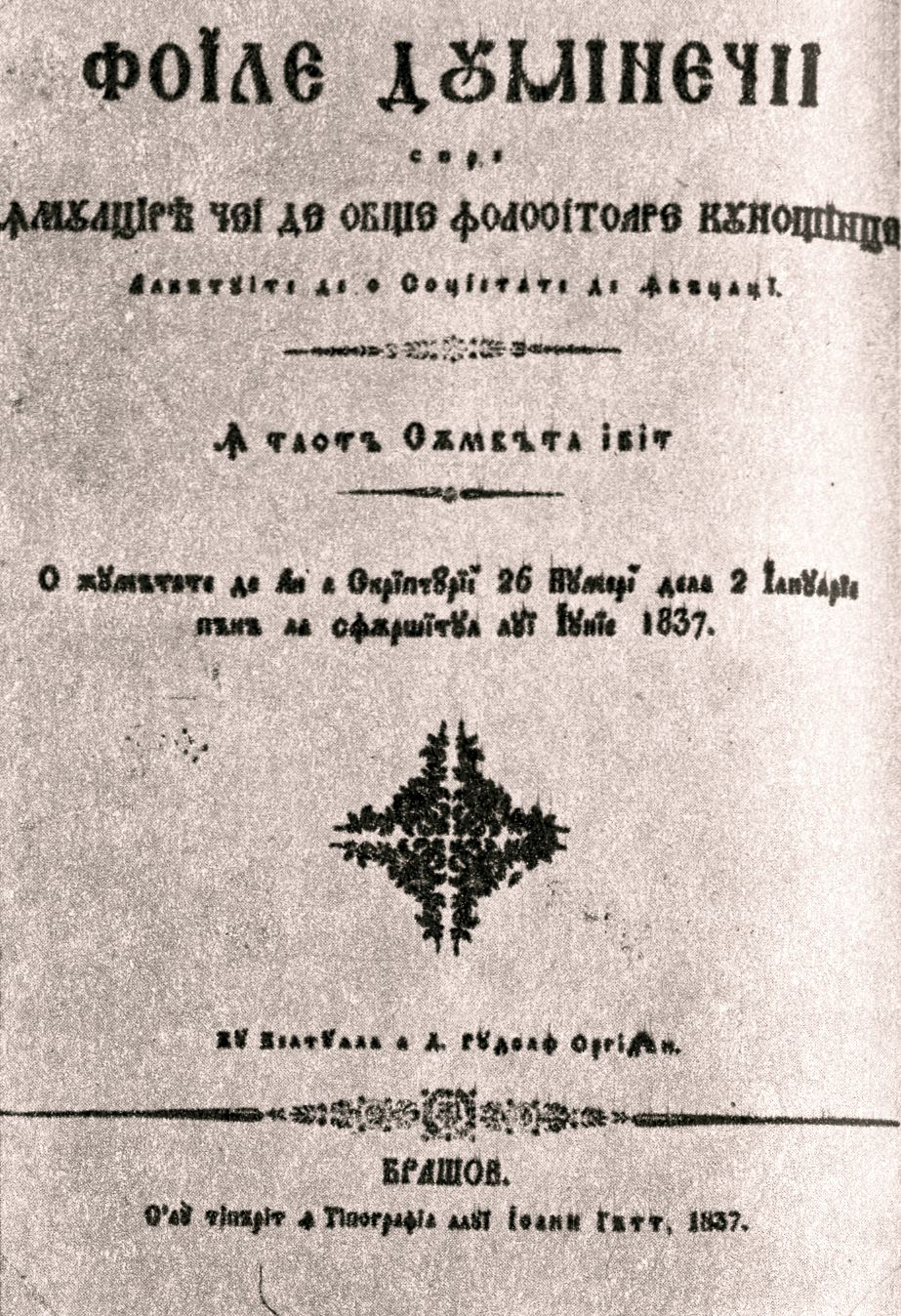 "Foile Duminecii" TranscriptionTransliterationФОĬΛЄ ДꙊМІНЄЧІĬ спрє ꙞМꙊΛЦİРѢ ЧЄİ ДЄ ОБЩЄ ФОΛОСİТОАРЄ КꙊНОЩİNЦЄĬ АʌкътȢітє дє o Сoцієтатє дє Ꙟвъцацĭ. Ꙟ таoтъ Сѫмбъта івіт О жȢмътатє дє Ан а СкрїптȢрїĭ 26 НȢмєрї дєʌа 2 İанȢарїє пънъ ʌа сфѫршїтȢʌ ʌȢĭ İȢнїє 1837. КȢ кєʌтȢѧʌа а Д. РȢдoʌф Оргідан. БРАШОВ. С'аȢ̆ тіпъріт ꙟ Тіпoграфіа аʌȢĭ İoанн Гътт, 1837.FOĬLE DUMINECIĬ spre ÎNMULȚIREA CEI DE OBȘTE FOLOSITOARE CUNOȘTINȚEĬ Alcătuite de o Soțietate de Învățațĭ. În taotă Sâmbăta ivit O jumătate de An a Scrïpturïĭ 26 Numerï dela 2 Ianuarïe pănă la sfârșïtul luĭ Iunïe 1837. Cu cheltuiala a D. Rudolf Orghidan. BRAȘOV. S'aŭ tipărit în Tipografia aluĭ Ioann Gătt, 1837